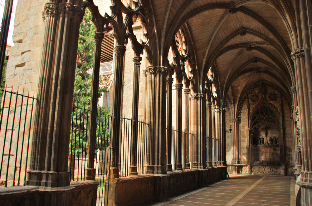 Lado oeste del claustro de la catedral de Pamplona